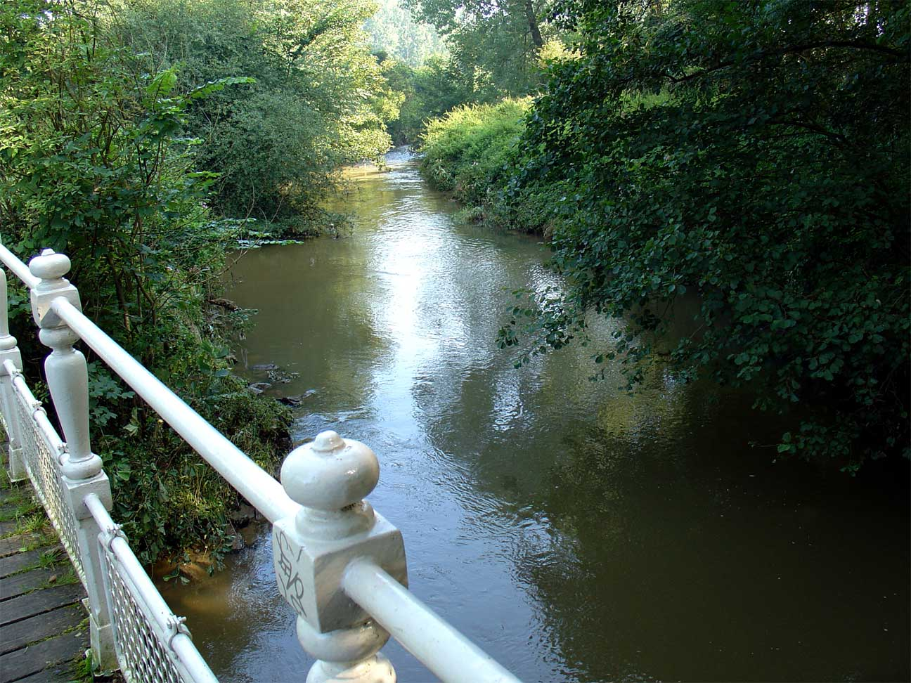 De Geul bij Strabeek (gem. Valkenburg in Limburg)